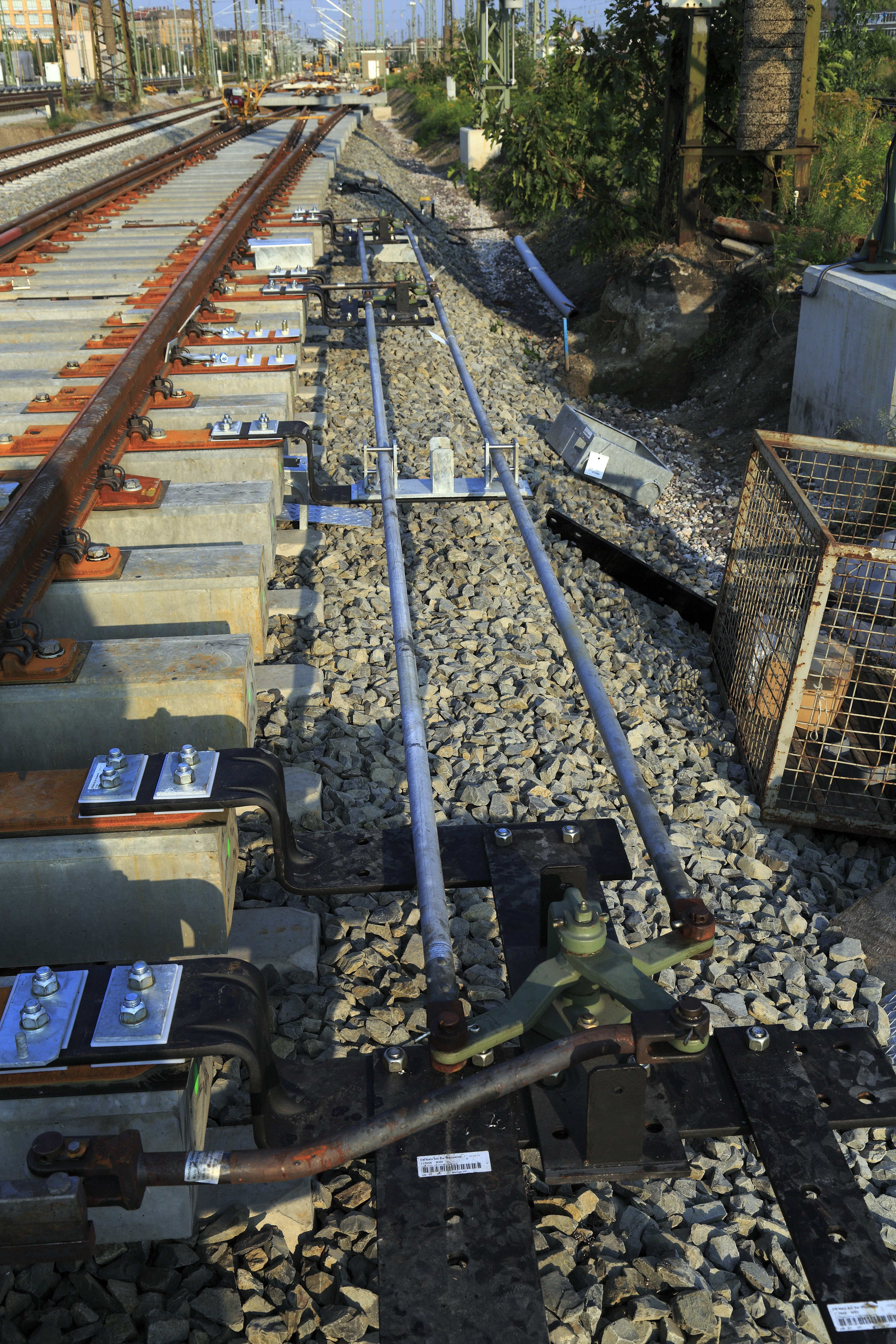 in Endlage links vor dem Abdecken. Durch das Doppelgestänge wird immer eine der Verbindungsstangen auf Zug beansprucht, ein Verbiegen oder Knicken ist im Betrieb ausgeschlossen. EW 54-760-1:18,5